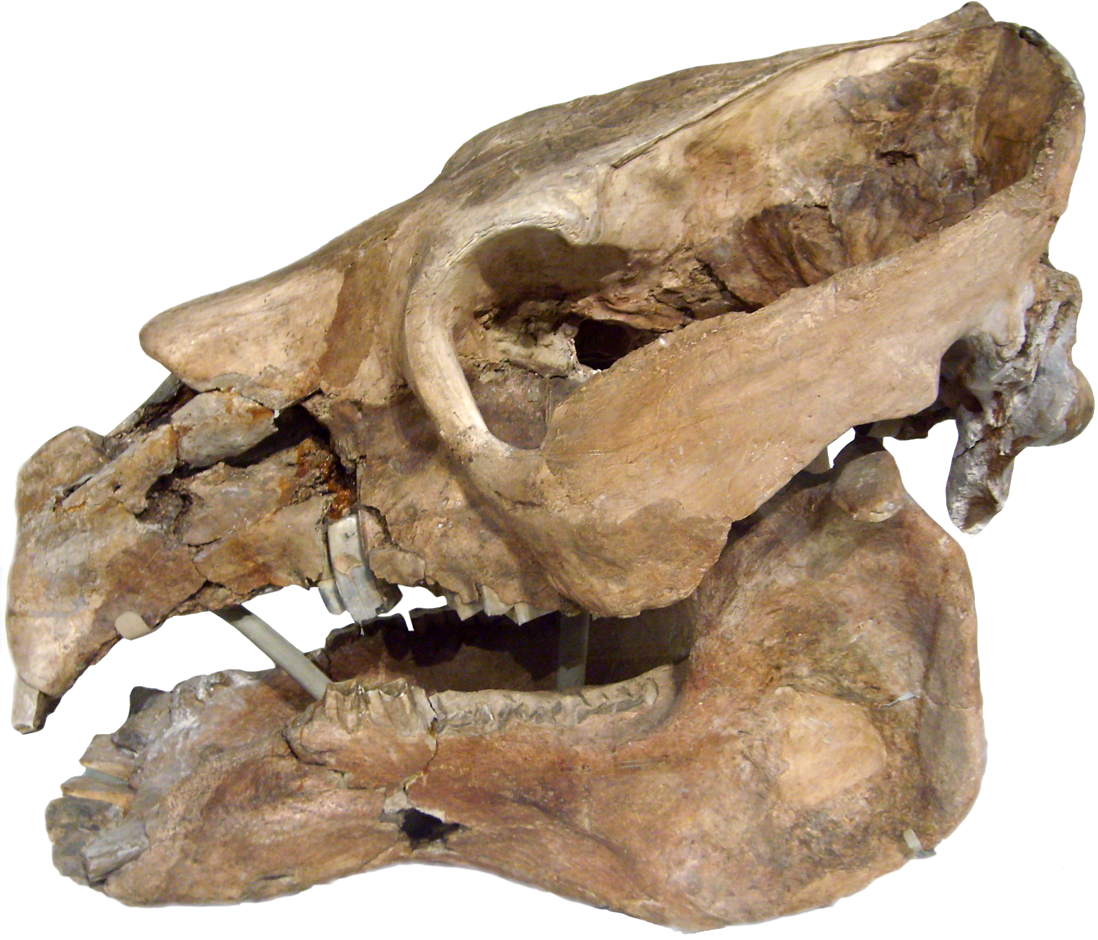 Toxodon skull, Zoologisk Museum, Copenhagen.